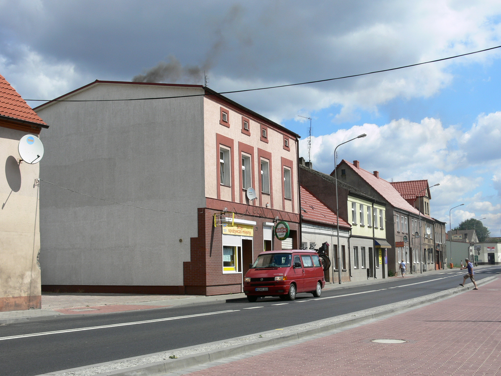 Kalisz Pomorski - fragment starej zachowanej zabudowy przy ul.Gen. Świerczewskiego